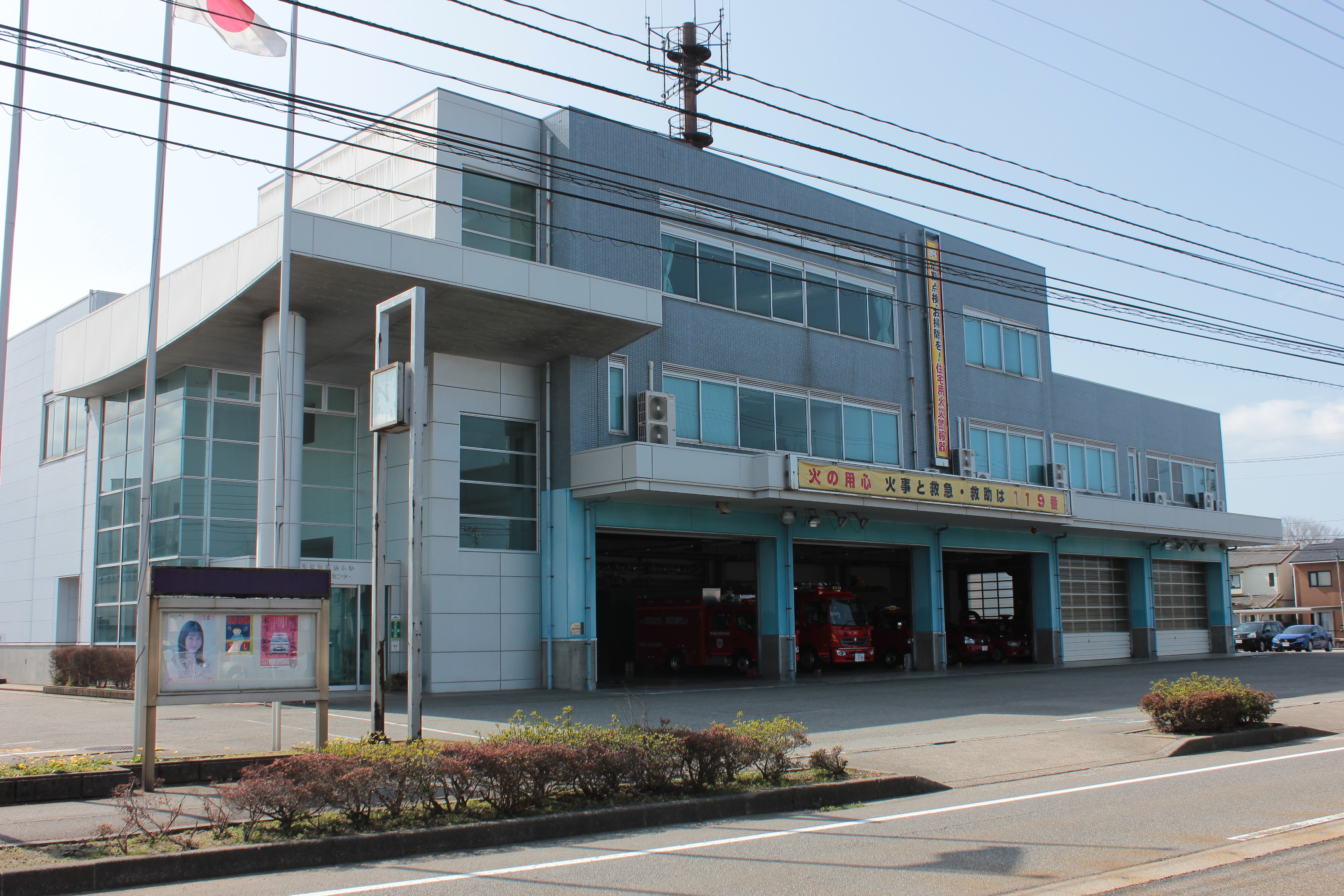 津幡町消防本部（石川県河北郡津幡町） Canon EOS Kiss X5